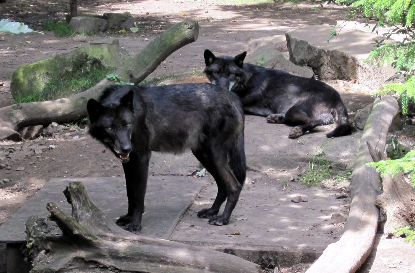 Timberwolf (canis lupus occidentalis, Mackenzie Valley Wolf) 2009 im Zoo Hannover. Lebensraum: östliche USA und Kanada. Nahrung: Hirsche, Karibus, Kanninchen, Insekten, Früchte. Laufgeschwindigkeit bis zu 60 km/h